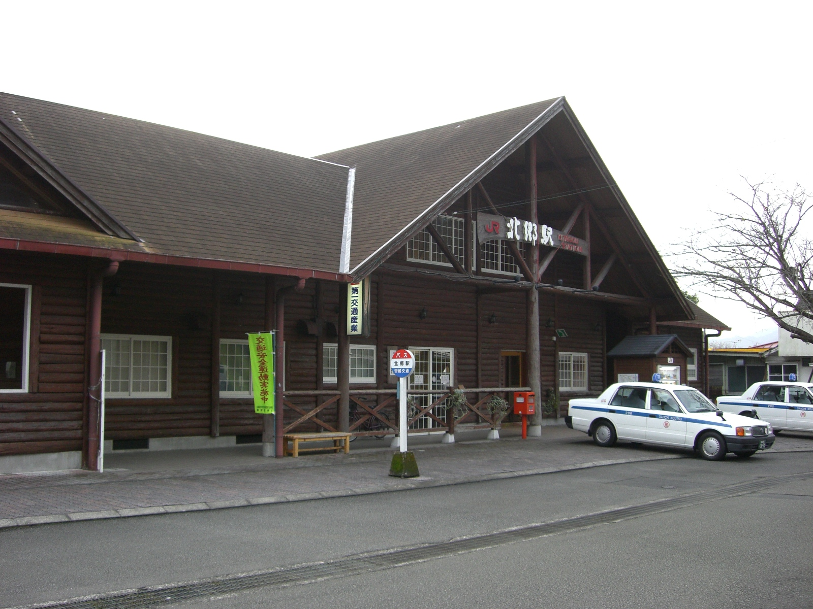 北郷駅駅舎